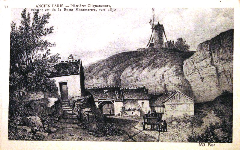 Entrées des carrières de gypse de Montmartre, sur le versant est de la butte, telles qu'elles étaient vers 1830.